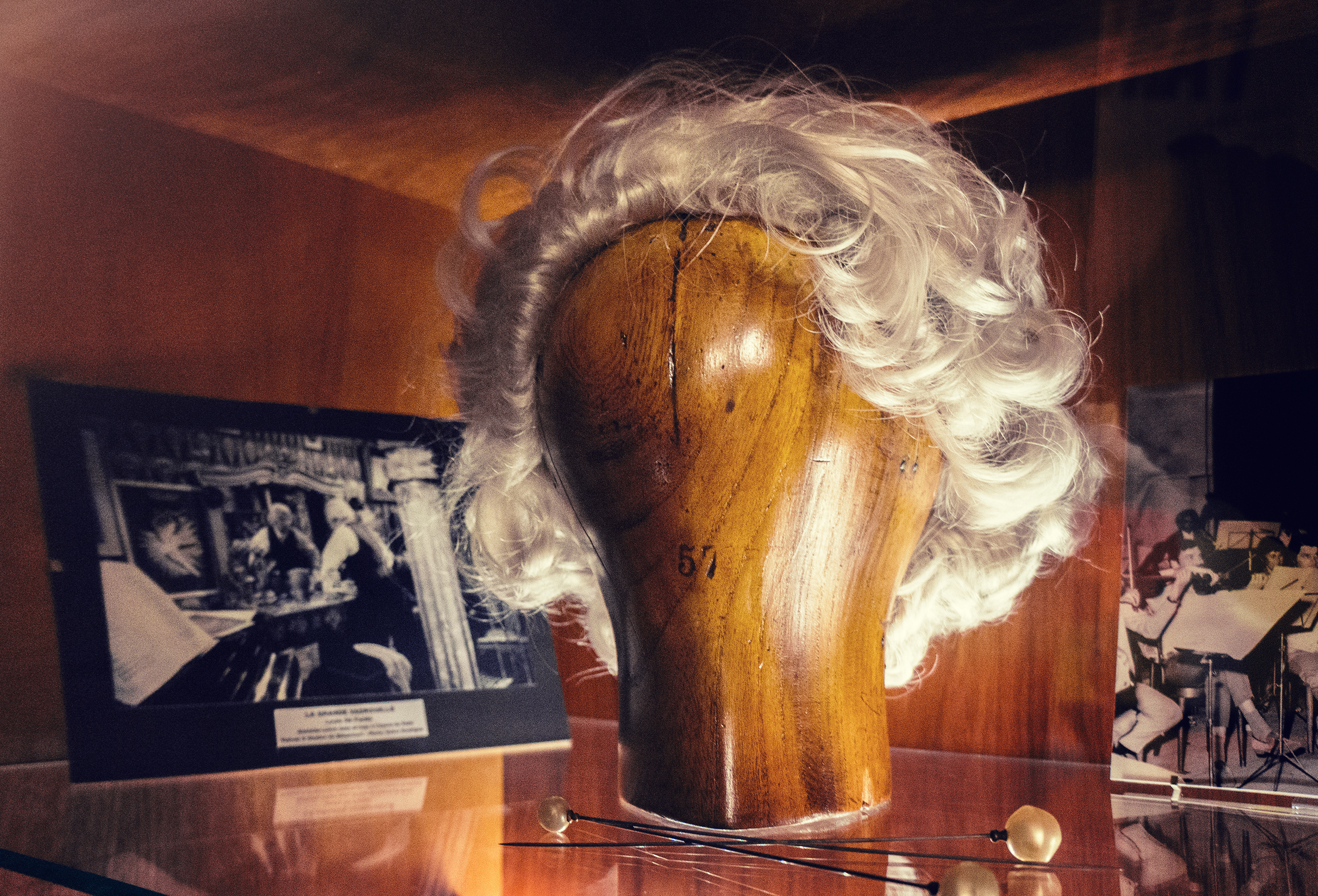 Perruque porté par Stanislas Lefort (Louis de Funès) dans la scène des égouts du film La Grande Vadrouille. Tête en bois pour porter la perruque utilisée aux studios de Boulogne-Billancourt. Épingles utilisées dans une scène dans la loge de Stanislas Lefort. Exposé au Musée Louis de Funès.